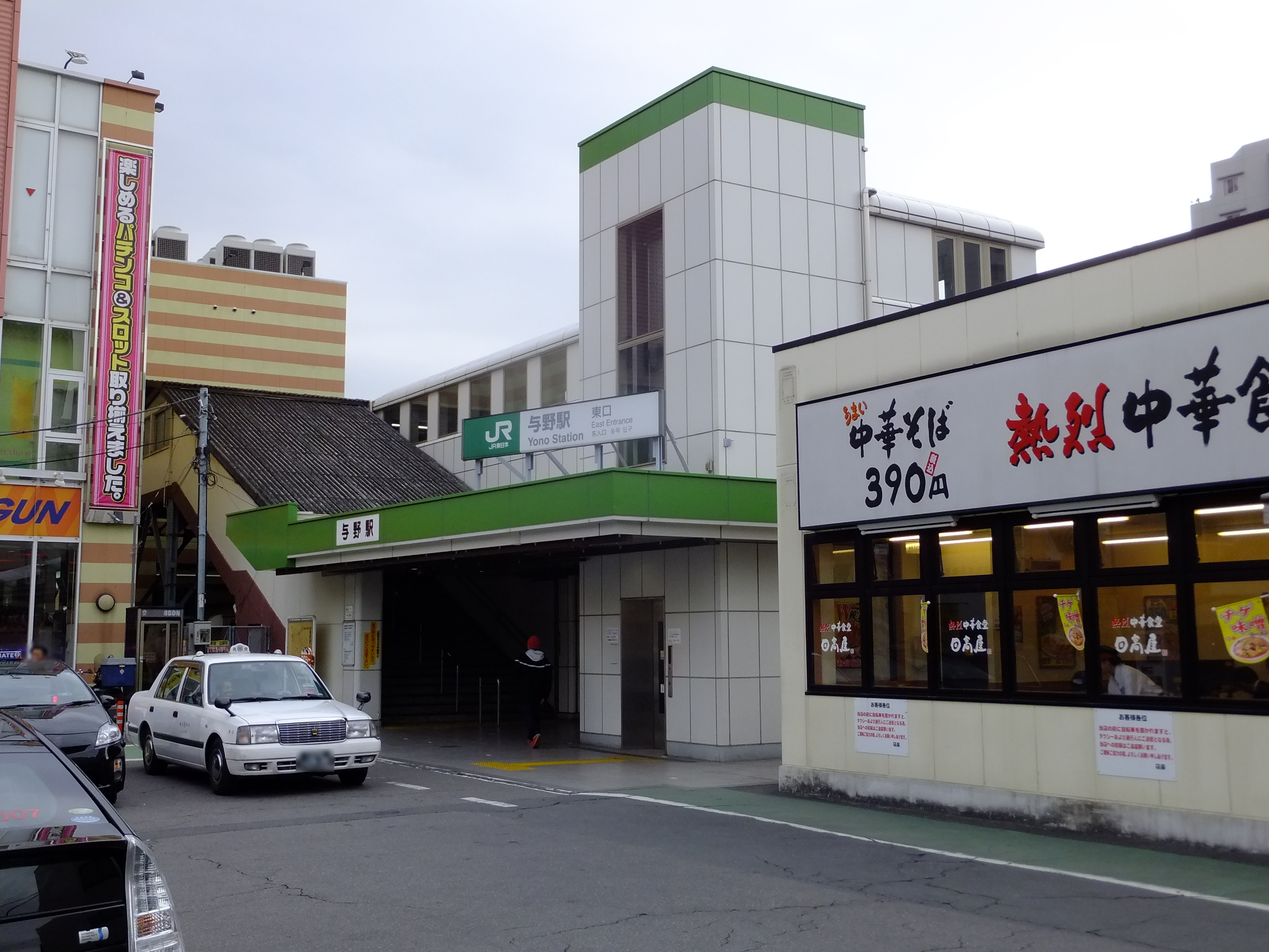 京浜東北線・与野駅東口（さいたま市浦和区）